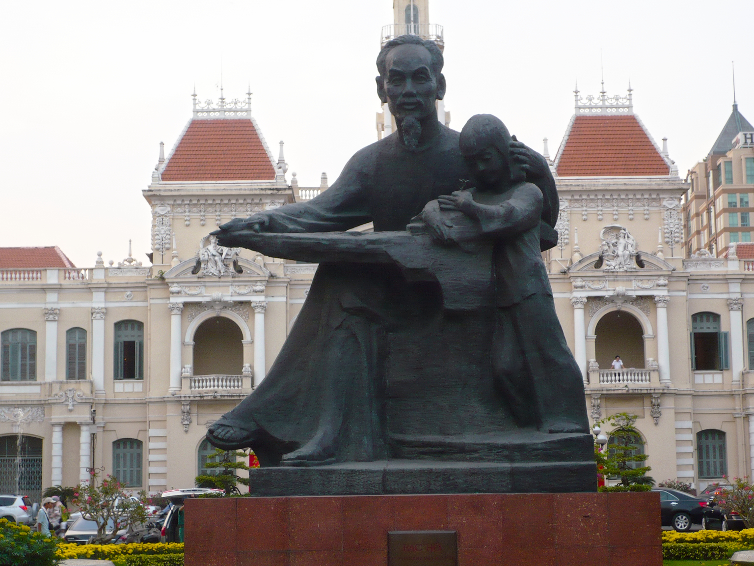 Tượng "Bác Hồ với Thiếu nhi" (tác giả Diệp Minh Châu) trước Trụ sở Ủy ban Nhân dân Thành phố Hồ Chí Minh